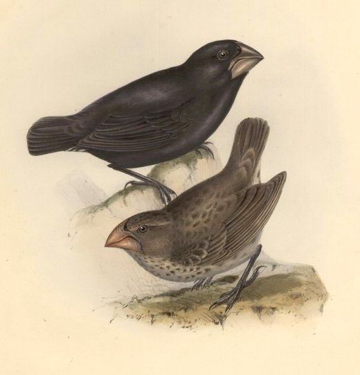 laut Bild: Geospiza strenua - , Laut diesem Text Geospiza magnirostris strenua